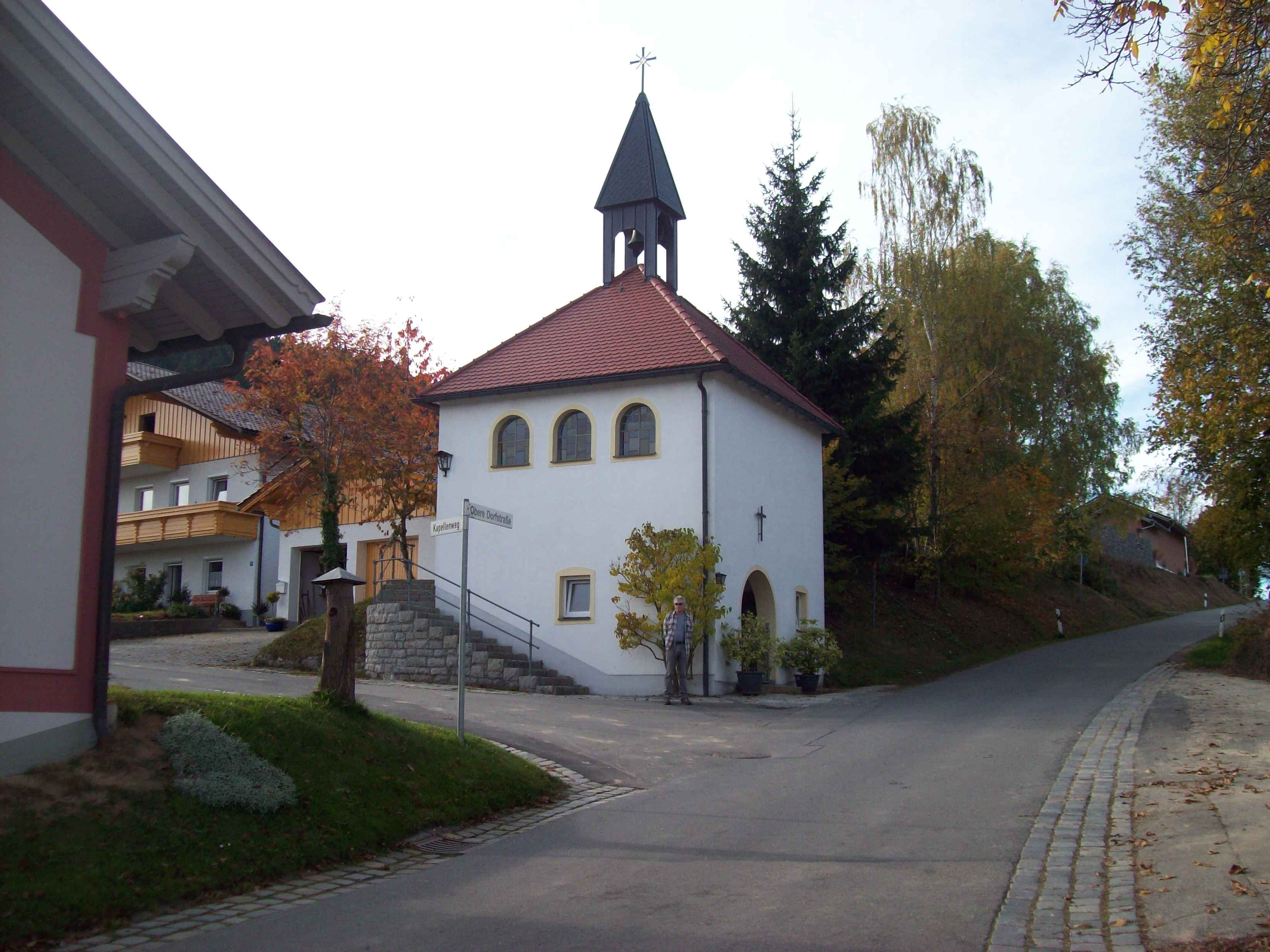 Neue Rehberger Dorfkapelle "Zur schmerzhaften Muttergottes" im Untergeschoß Aufbahrungs- und Aussegnungsraum für Verstorbene, errichtet 1963/64